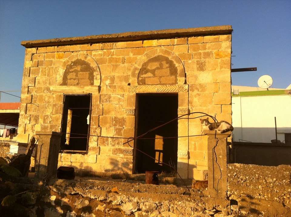 غرفة العليّة - أحد الأبنية القديمة والمهملة في بلدة عبا